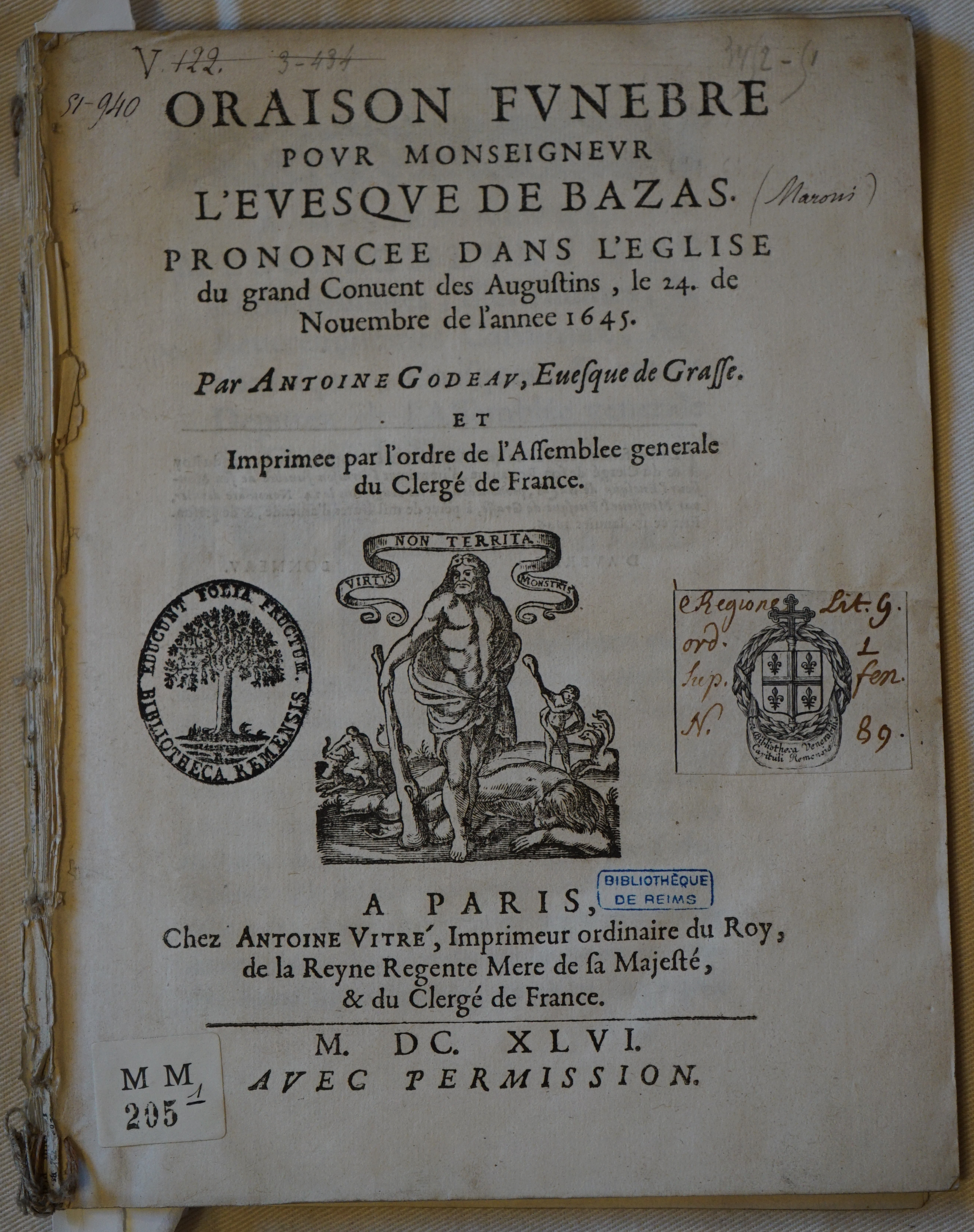 oraison funèbre de Henri Listolfi lue par Godeau. Imprimé à Paris par Antoine Vitré.